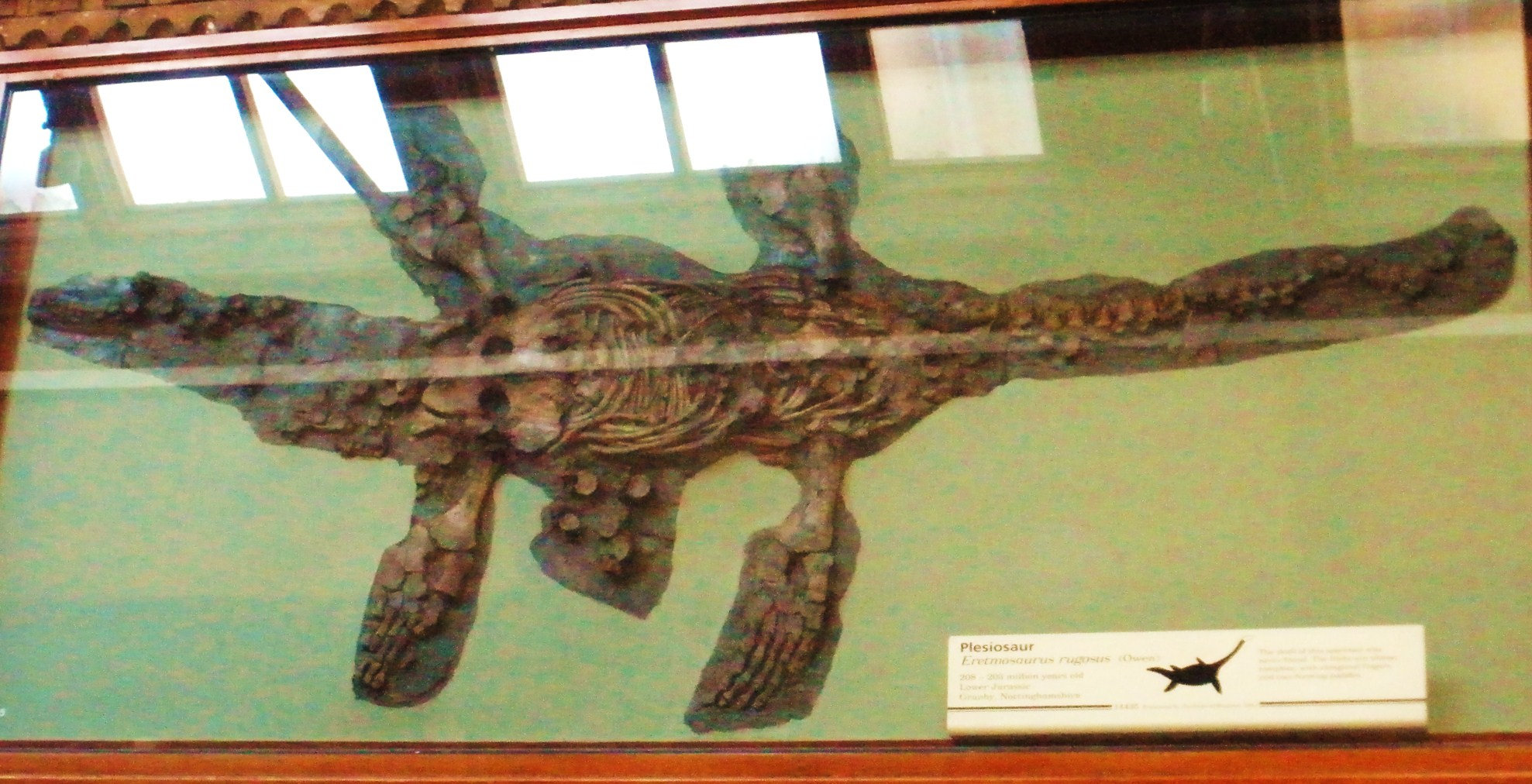 Fossil of Eretmosaurus, an extinct reptile-- Took the photo at Natural History Museum, London